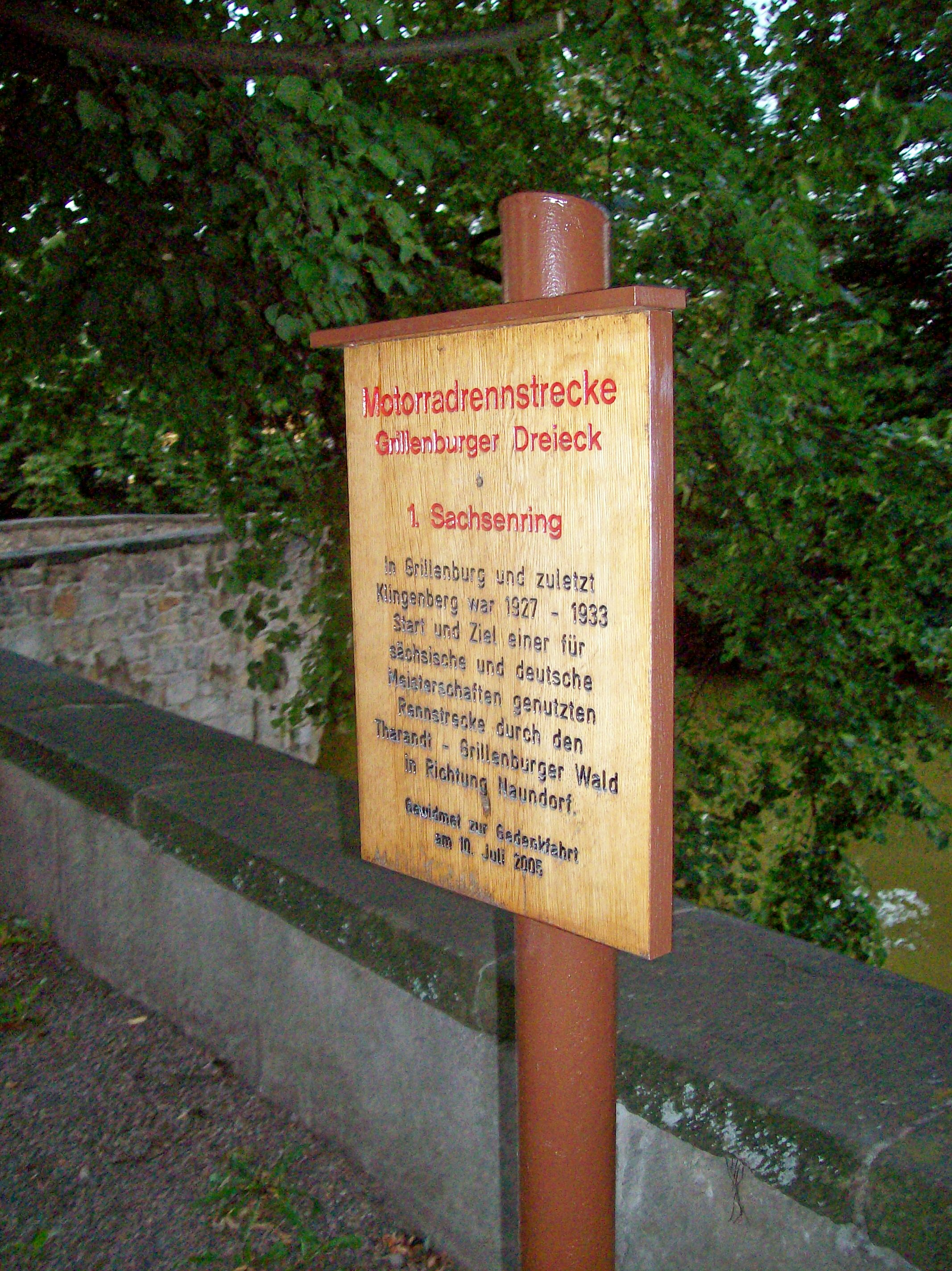 Gedenktafel Sachsenring Grillenburg